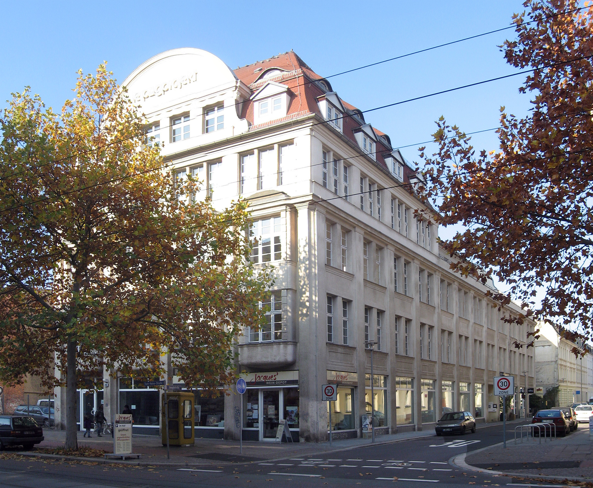 Ehemaliger „Josephkonsum“ in Leipzig, Karl-Heine-Straße 46 und Josephstraße 44–46, erbaut von Emil Franz Hänsel, eröffnet am 24. Oktober 1912